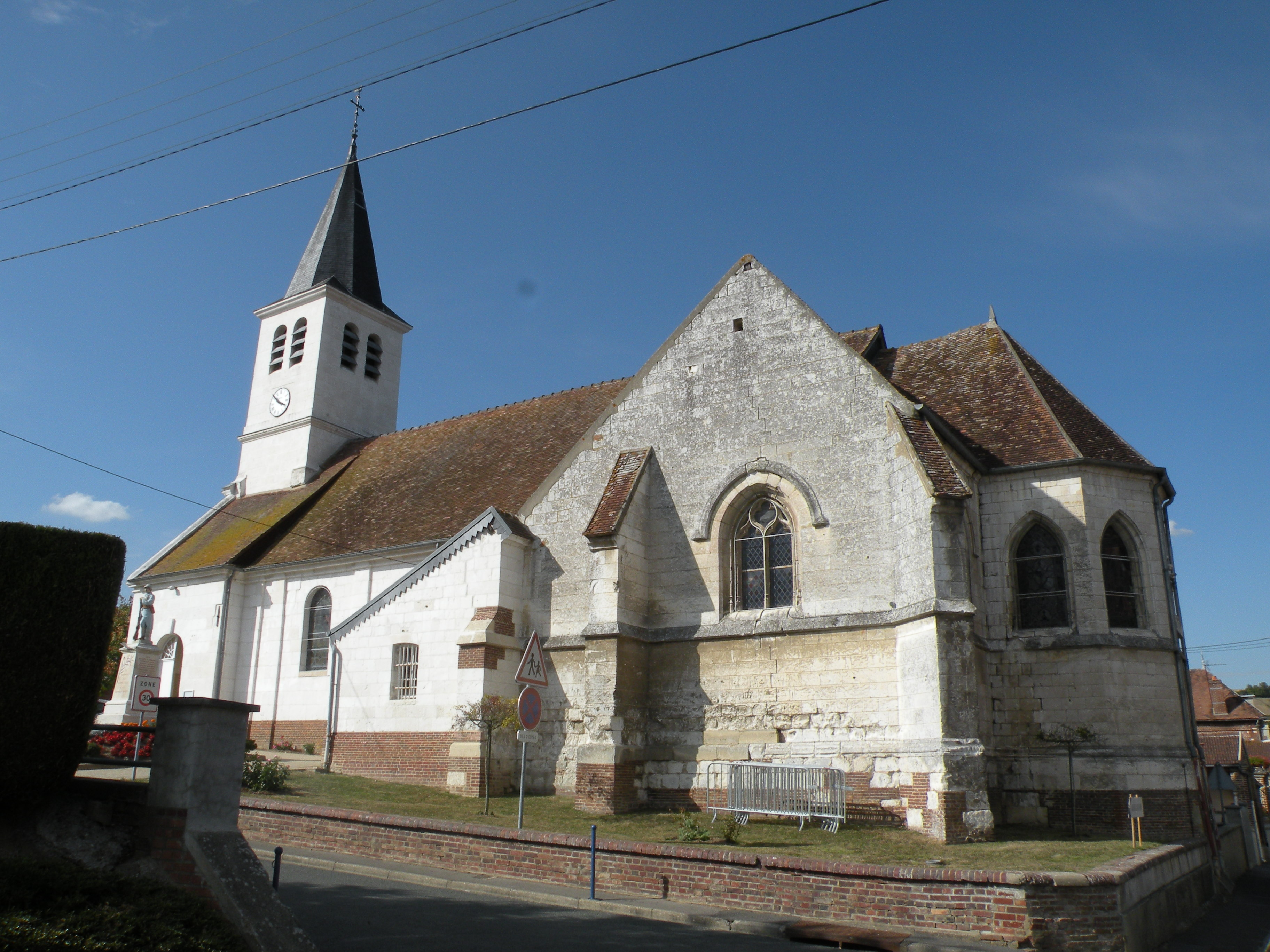 Église Saint-Lubin de Goincourt